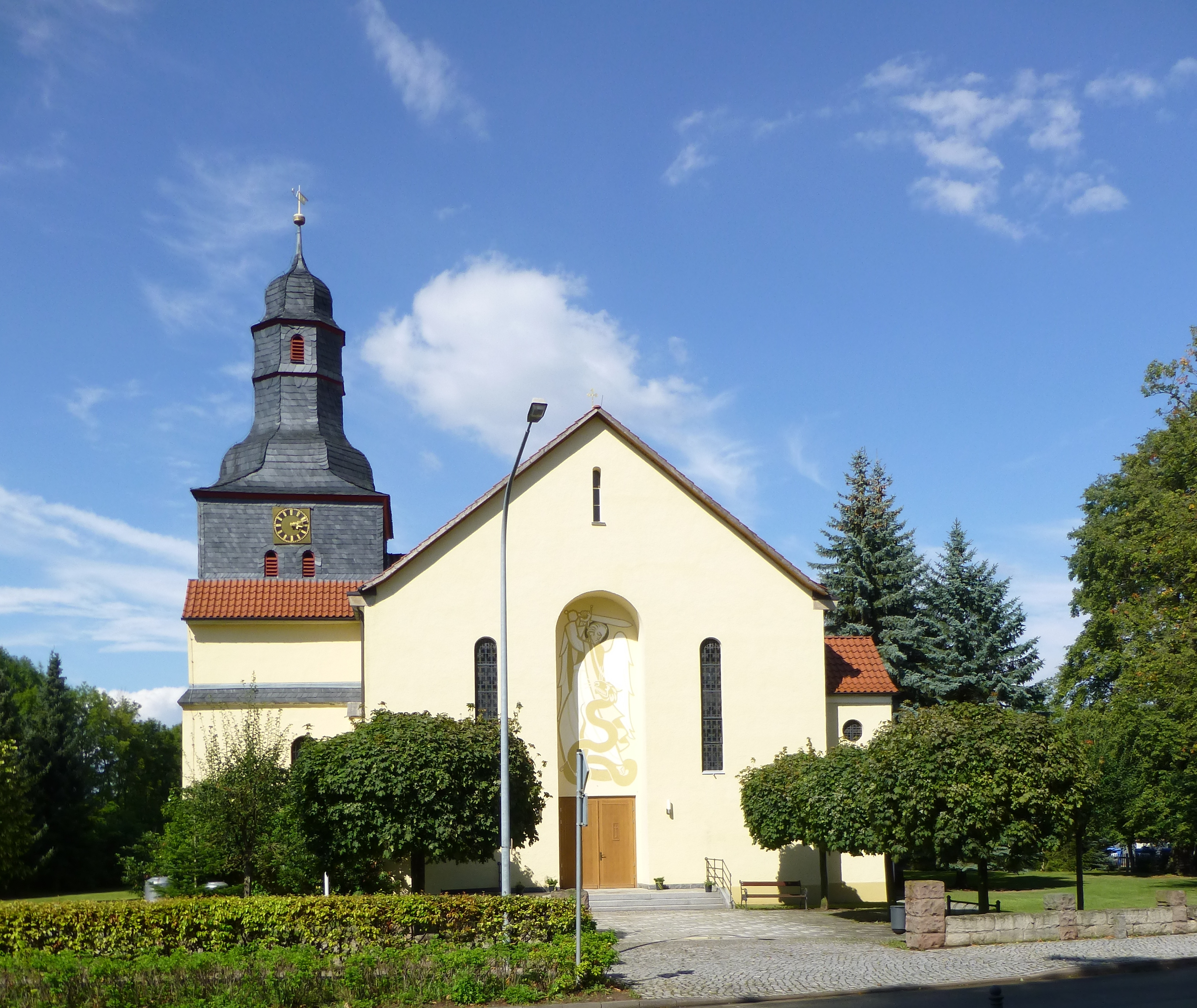 Kath, Kirche St. Andreas in Teistungen, erbaut 1933 unter Dechant Franz Arend, Turm älter.